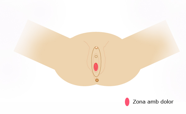 Zones de dolor en la vulvodínia localitzada